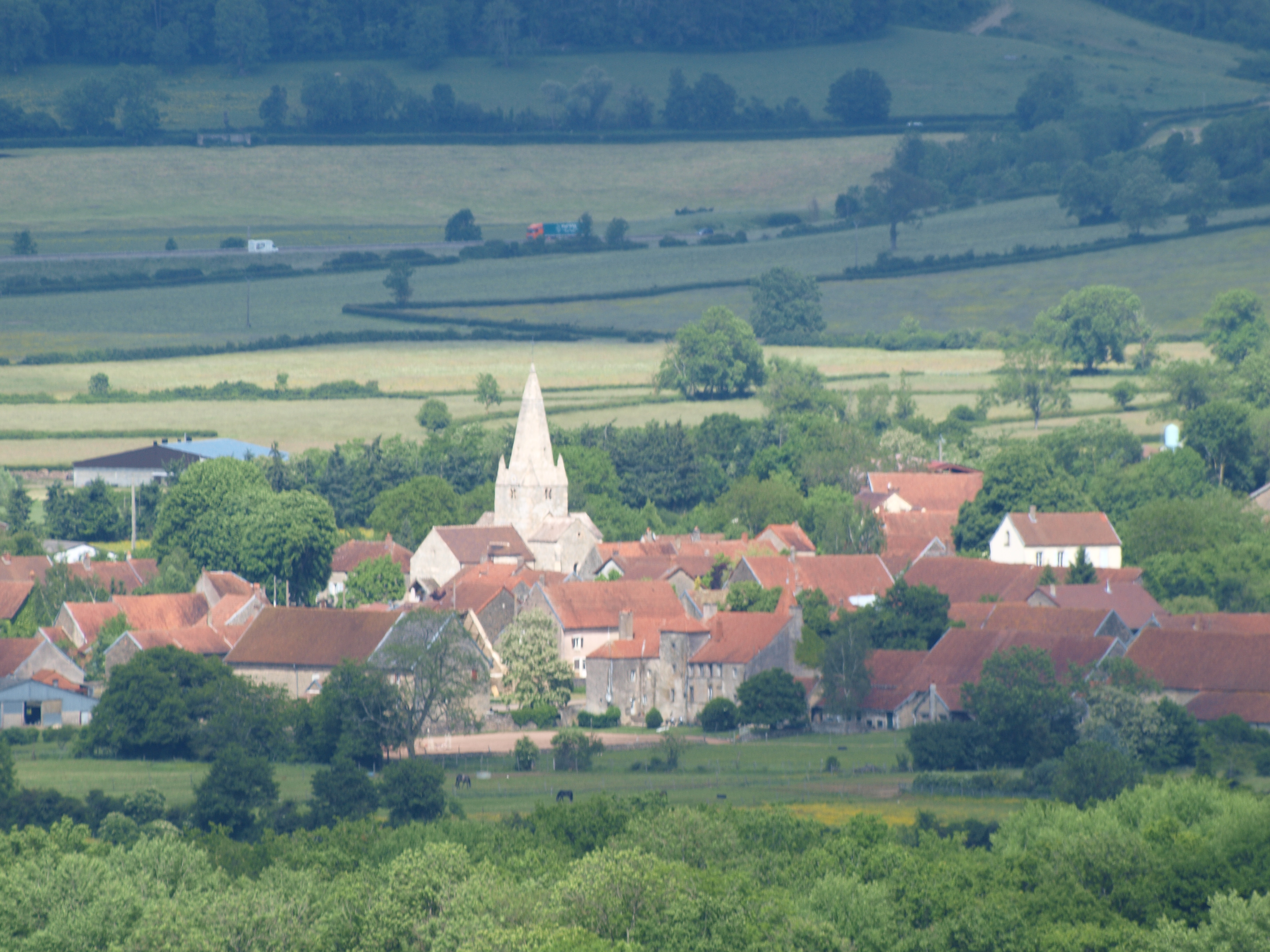 Thoisy-le-Désert (Côte-d'Or, France)